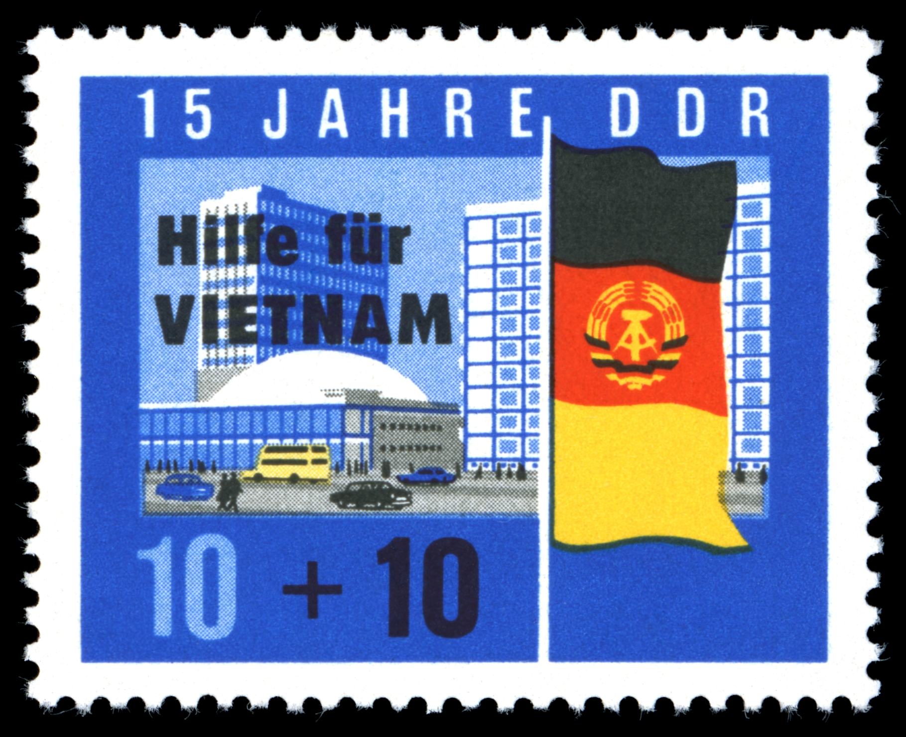 Information: Hilfe für Vietnam Ausgabepreis: 10+10 Pfennig First Day of Issue / Erstausgabetag: 23. August 1965 Auflage: 4.000.000 Entwurf: Henning und Dorfstecher Druckverfahren: Offsetdruck/Überdruck Offsetdruck Michel-Katalog-Nr: Ländercode-MiNr: 1125